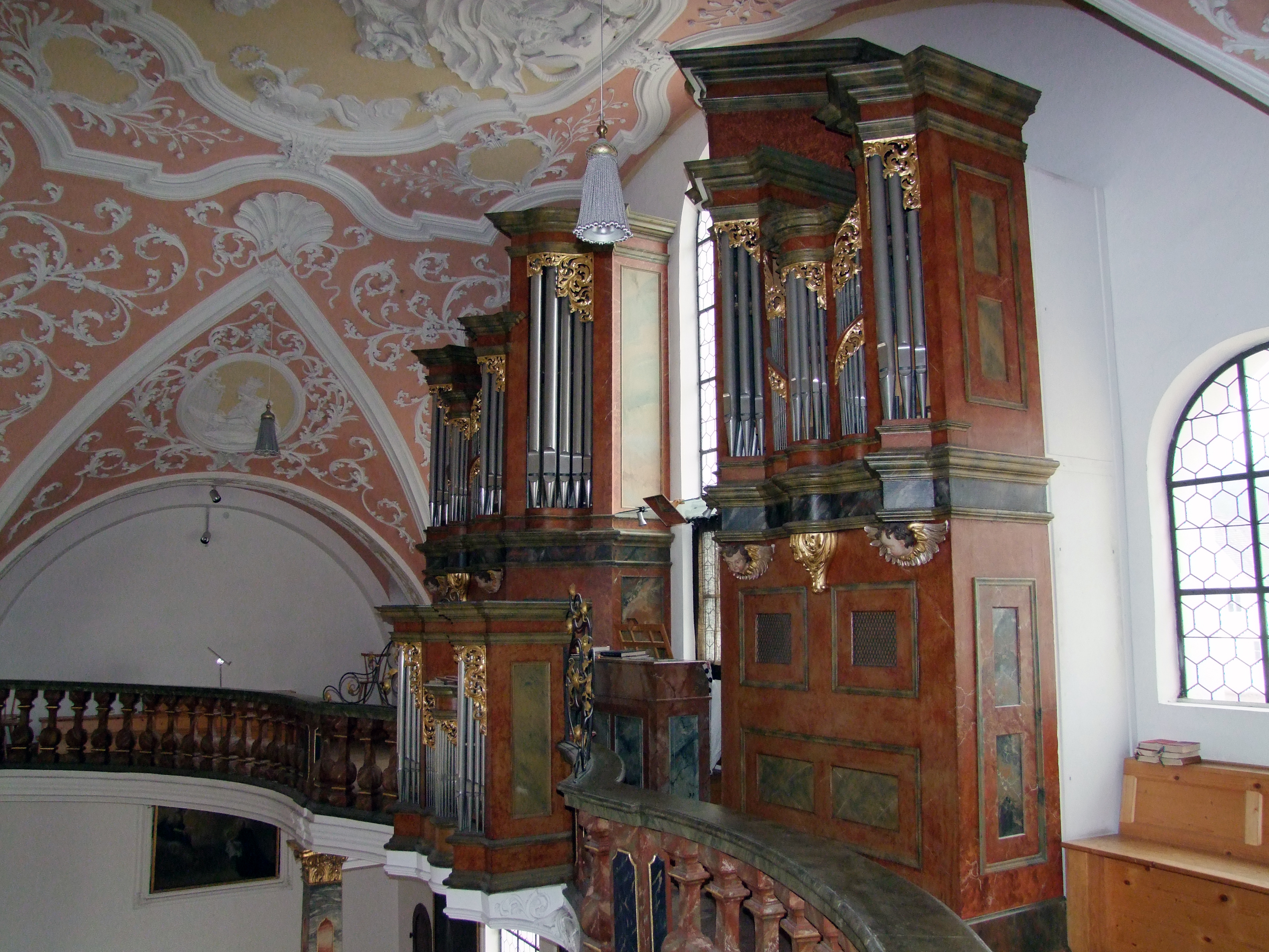 Mariä Verkündigung im oberschwäbischen Mindelheim. Ehemalige Augustiner, dann Jesuitenklosterkirche.